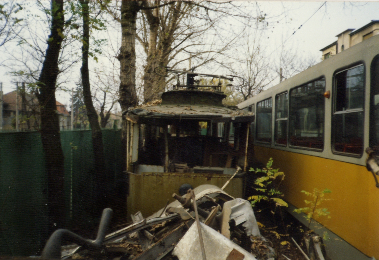 Straßenbahn Timisoara